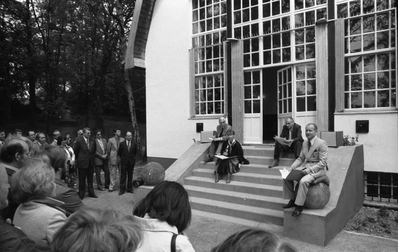 Buckow, Brecht-Weigel-Haus ADN-ZB/Senft/1.6.77/Bez. Frankfurt/Oder: Das Brecht-Weigel-Haus in Buckow bei Berlin ist am 1.6.77 der Öffentlichkeit übergeben worden. Ehemals Stätte der Arbeit, des Studiums und der Erholung der beiden bedeutenden Künstler, lädt es jetzt zur Information und zur Diskussion über das Lebenswerk von Bertold Brecht und Helene Weigel ein. In einer Feierstunde lasen Künstler des Berliner Ensembles aus Werken und Notizen von Brecht und der Weigel - v.r.n.l. Ekkehard Schall, Prof. Manfred Wekwerth, Jutta Hoffmann und Willi Schwabe. Abgebildete Personen: Schall, Ekkehard: Schauspieler, DDR Wekwerth, Manfred Prof. Dr.: Präsident der Akademie der Künste (AdK), Intendant des Berliner Ensembles, Zentralkomitee (ZK) der SED, DDR Hoffmann, Jutta: Schauspielerin, DDR (PND 122063929) Schwabe, Willi: Schauspieler, Mitglied des Berliner Ensembles, DDR